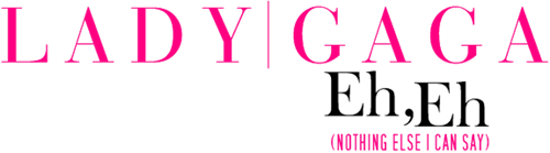 Logo de "Eh, Eh (Nothing Else I Can Say)", creado por User:El Javo y subido por mí